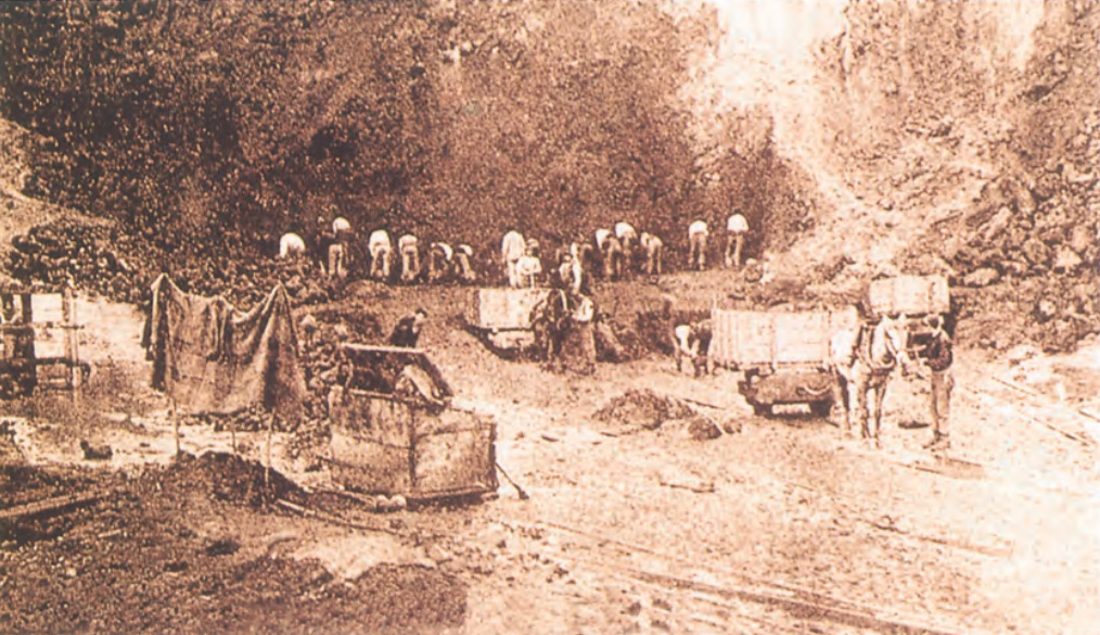 Ollargan meatzeak c 1890